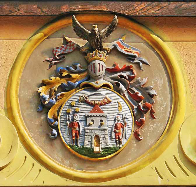 Grb Plemenite općine Turopolje na Muzeju Turopolja, Velika Gorica